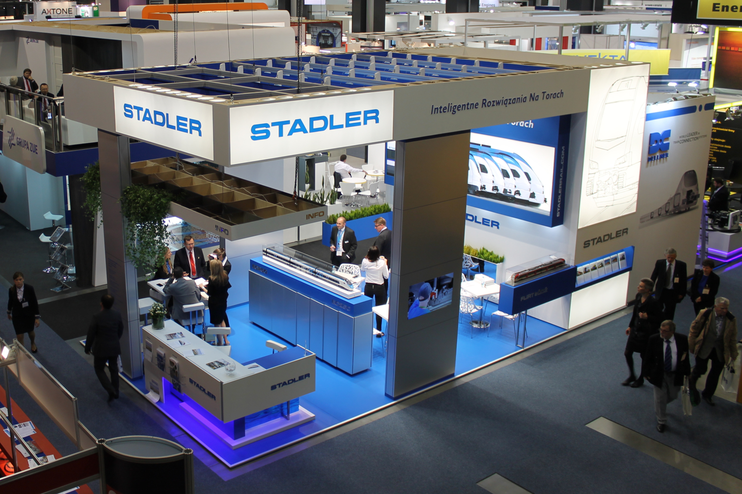 Stoisko Stadlera podczas targów Trako 2015. The making of this document was supported by Wikimedia Polska Association, within Wikigrant no. WG 2015-34. English | polski | +/−